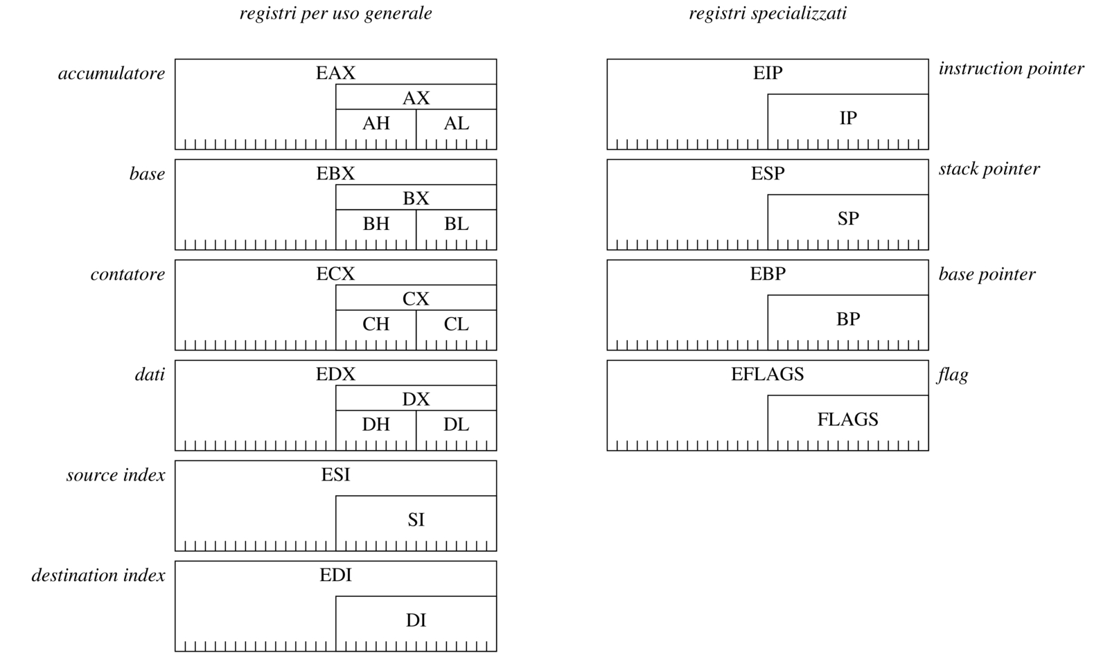 Figura 64.2. Registri principali.